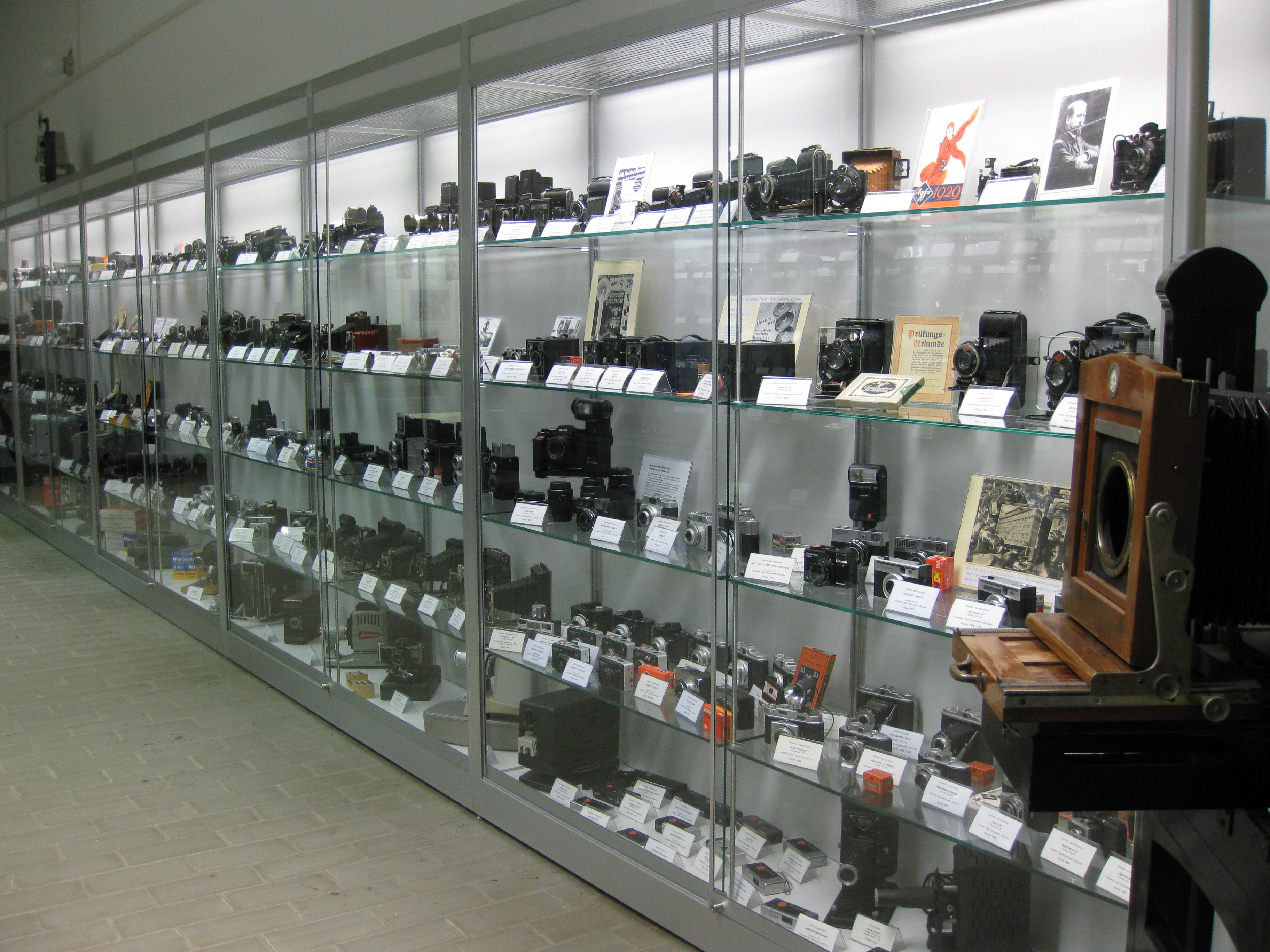 Fotoapparateaustellung im Industrie- und Filmmuseum Wolfen